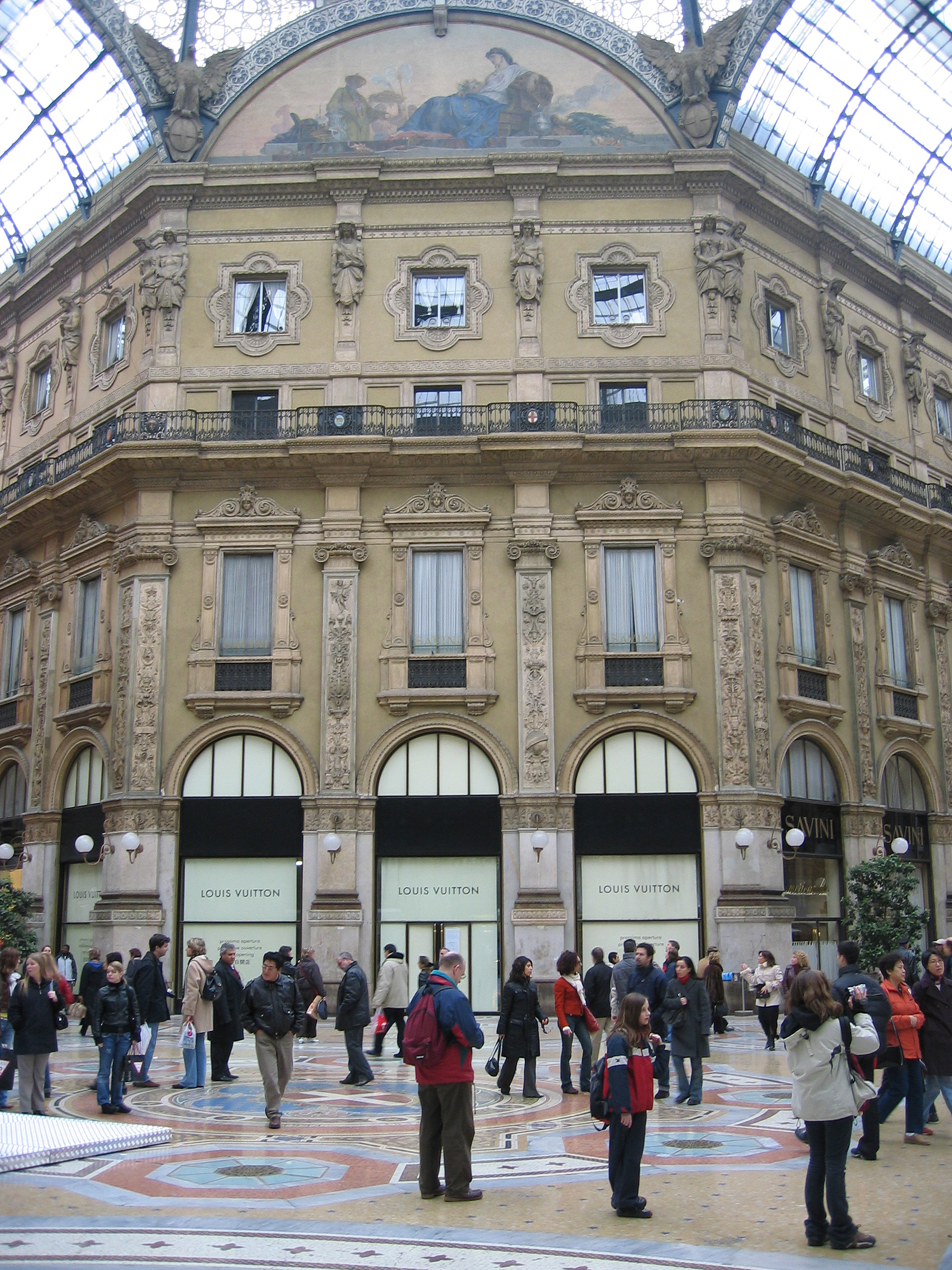 Milano, Galleria Vittorio Emanuele II.